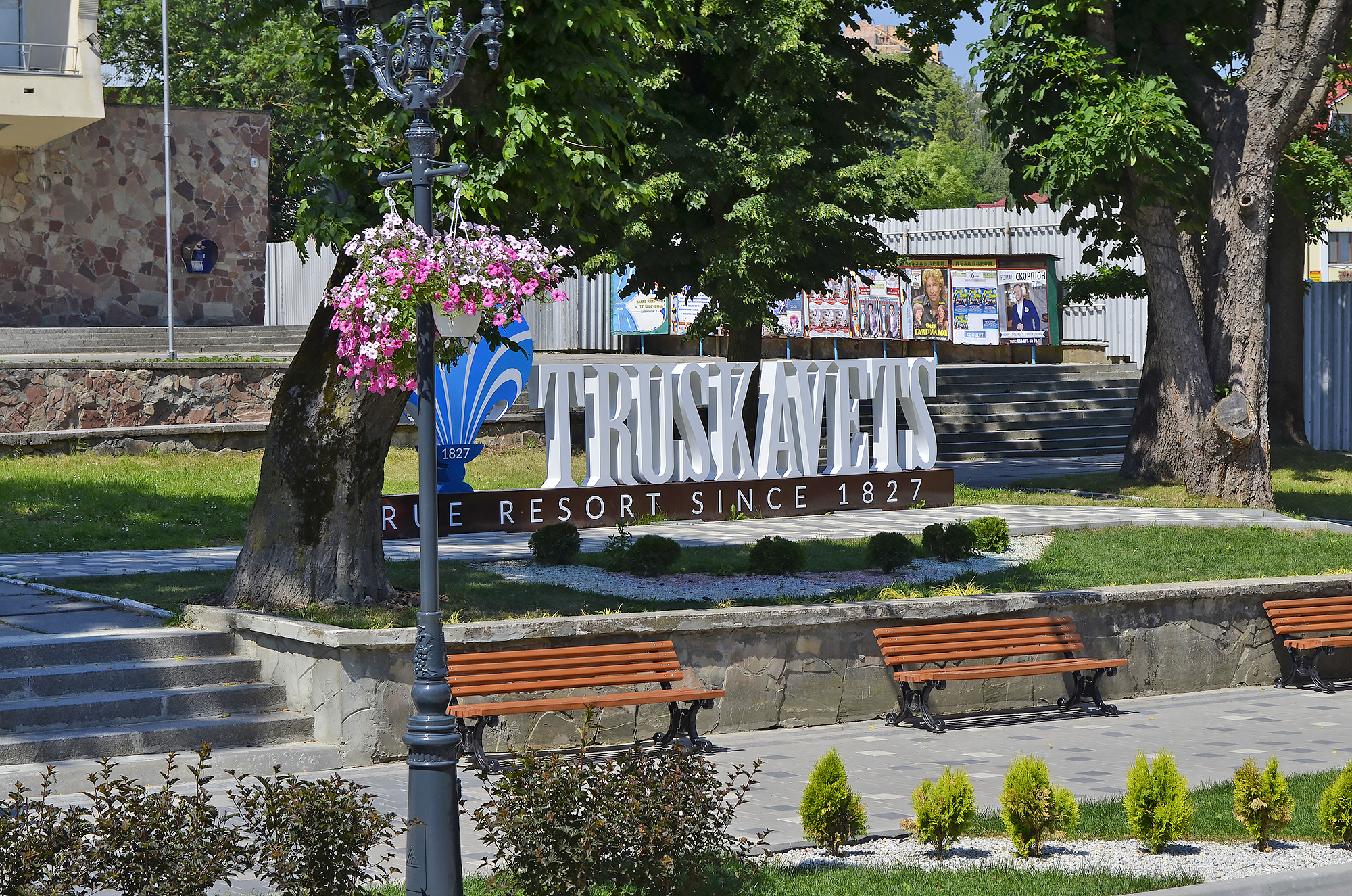 Сучасний пішохідний проспект - місце для фотографій (навпроти БК Шевченко, в народі "Шайба")